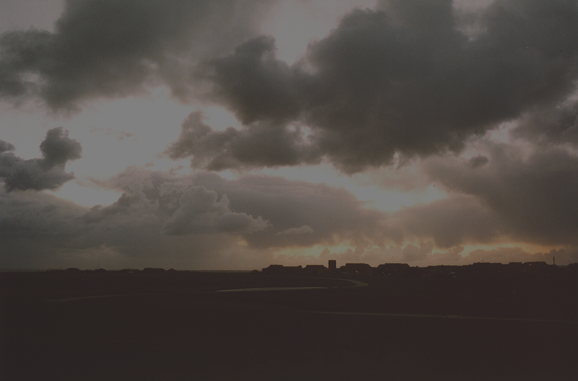 Dämmerung nach Sonnenuntergang über Baltrum. Blick nach Westen über die Insel zum Hafen. Fotografiert im Februar 2004.